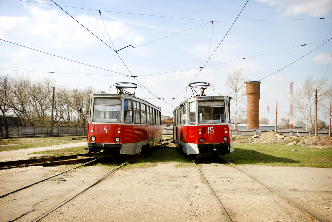 Вагоны в трамвайном депо Рязани спустя несколько дней после закрытия трамвайного движения в городе